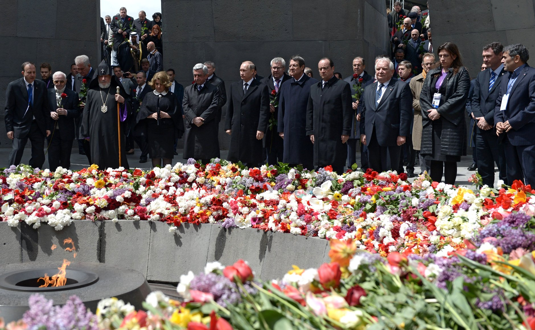 Президент России Владимир Путин на церемонии поминовения жертв геноцида армян в мемориальном комплексе «Цицернакаберд»